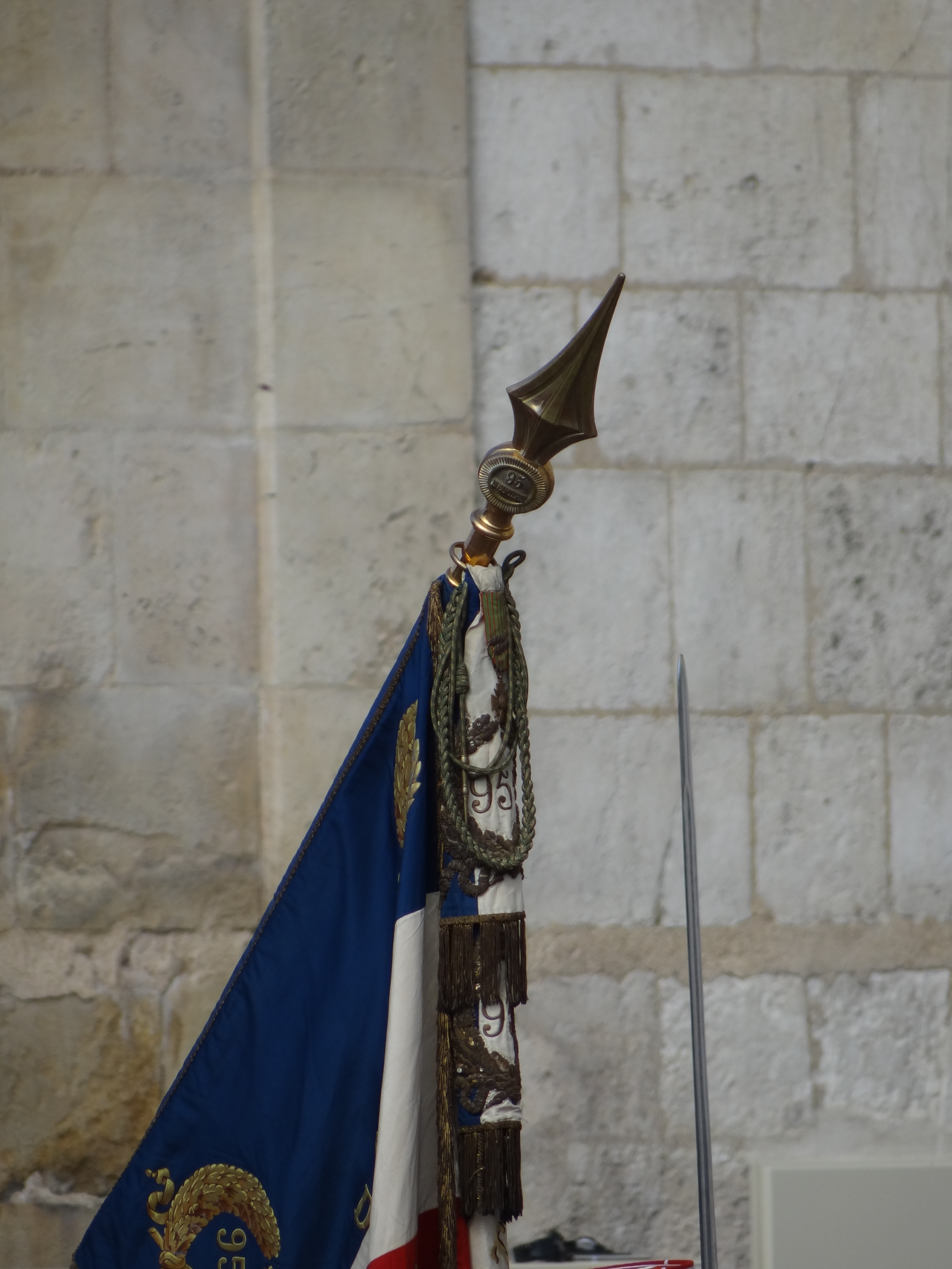 Détail de la cravate du drapeau du 95e RI. On y distingue la crois de guerre 1914-1918 avec 2 palmes ainsi que la fourragère aux couleur de cette même décoration.